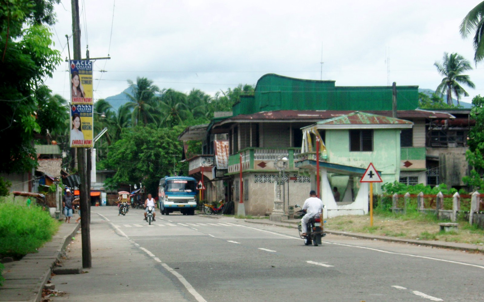 Javier, Leyte, Philippines